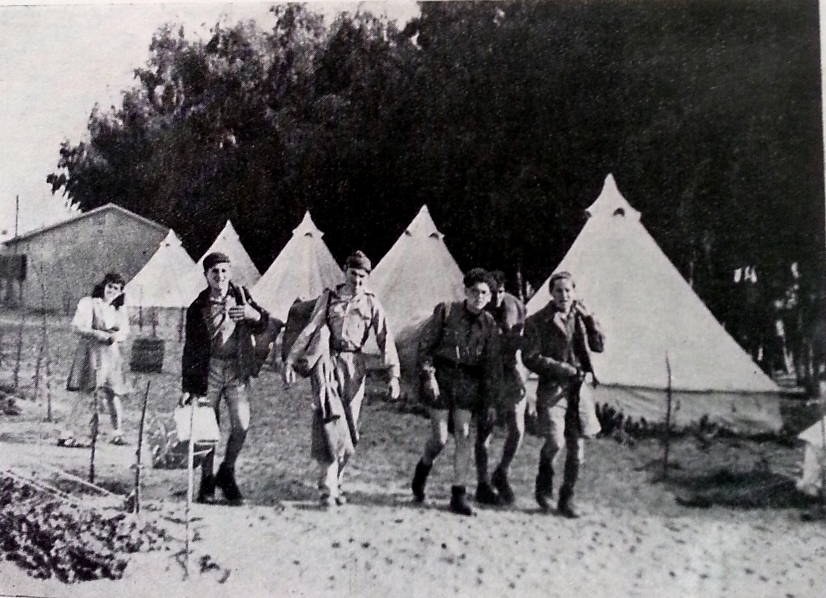 במחנה העולים בקריית שמואל (מאוסף לשכת עלית הנוער), צולם עד 1947